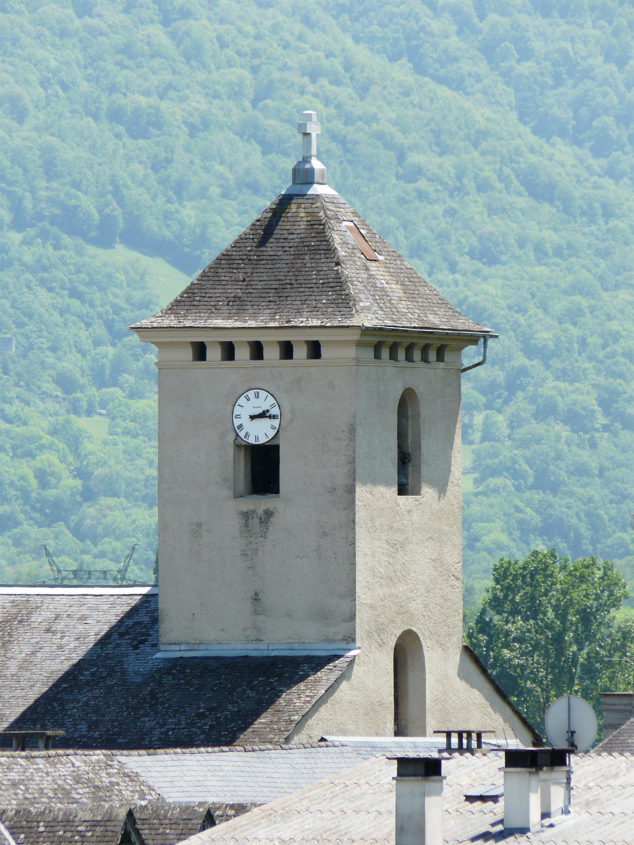 Le clocher de l'église de Lau, Lau-Balagnas, Hautes-Pyrénées, France.